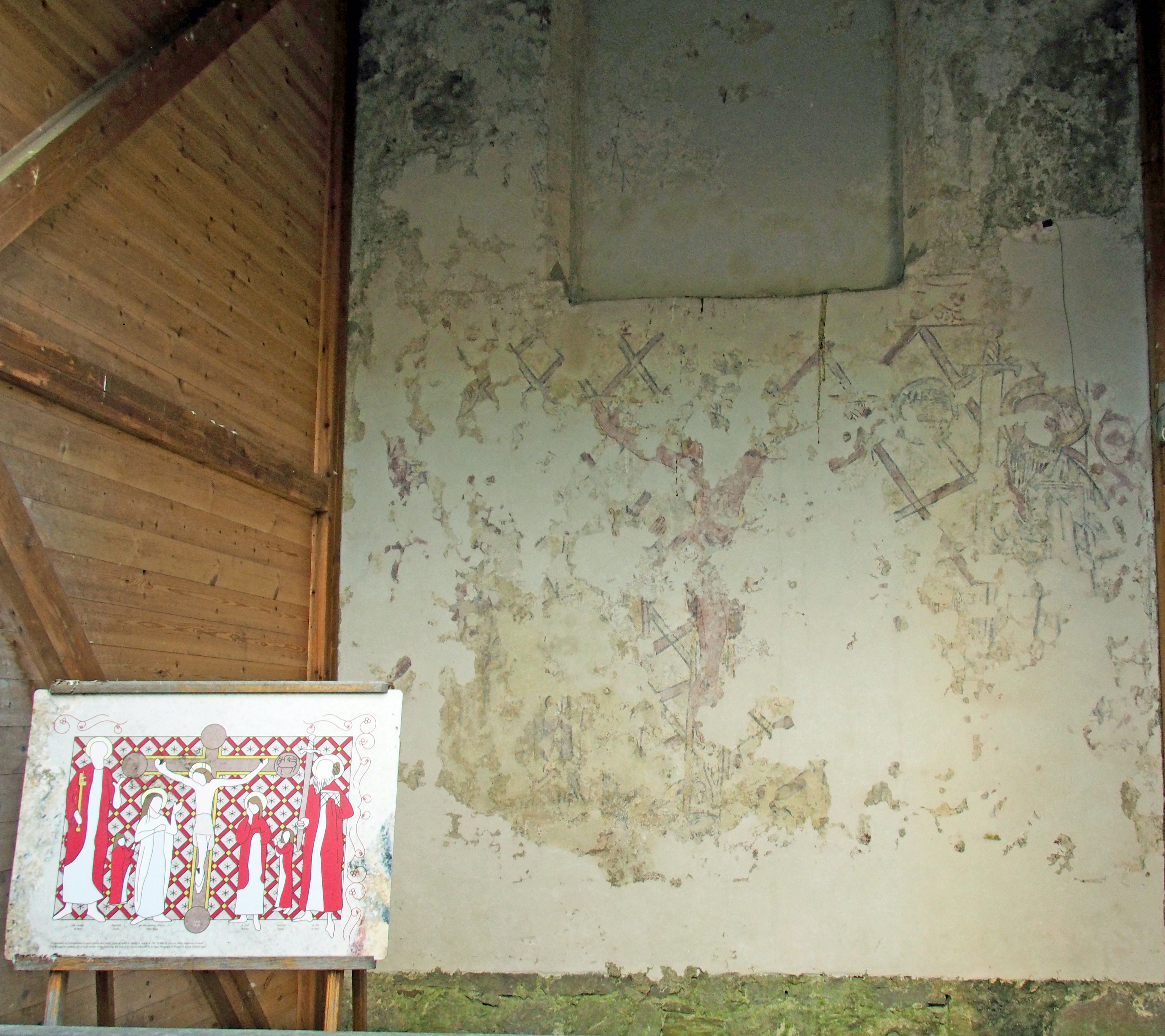 Fresken-Restaurierung in Cormac's Chapel, Rock of Cashel, County Tipperary Irland